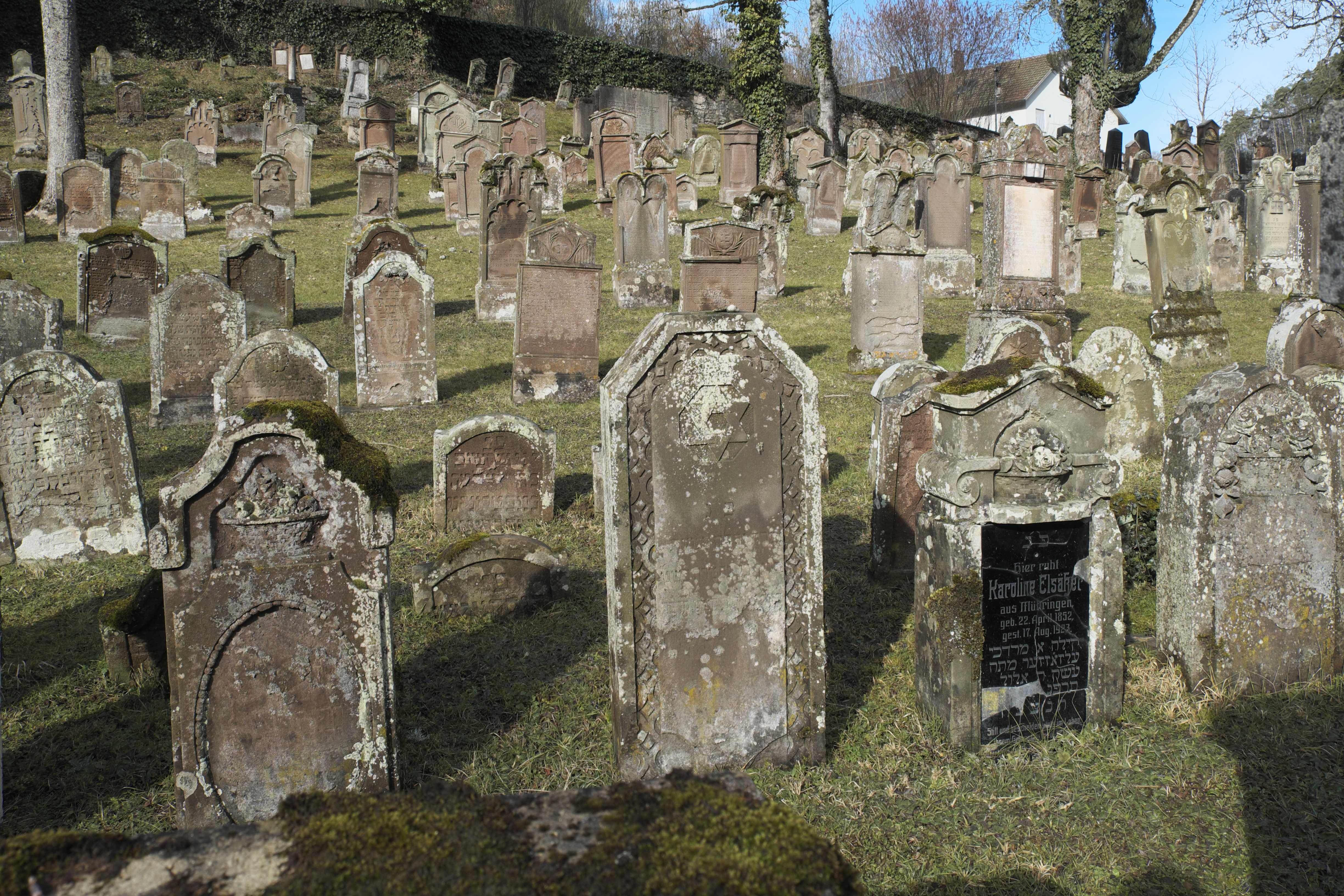 Jüdischer Friedhof in Haigerloch im Zollernalbkreis (Baden-Württemberg/Deutschland)